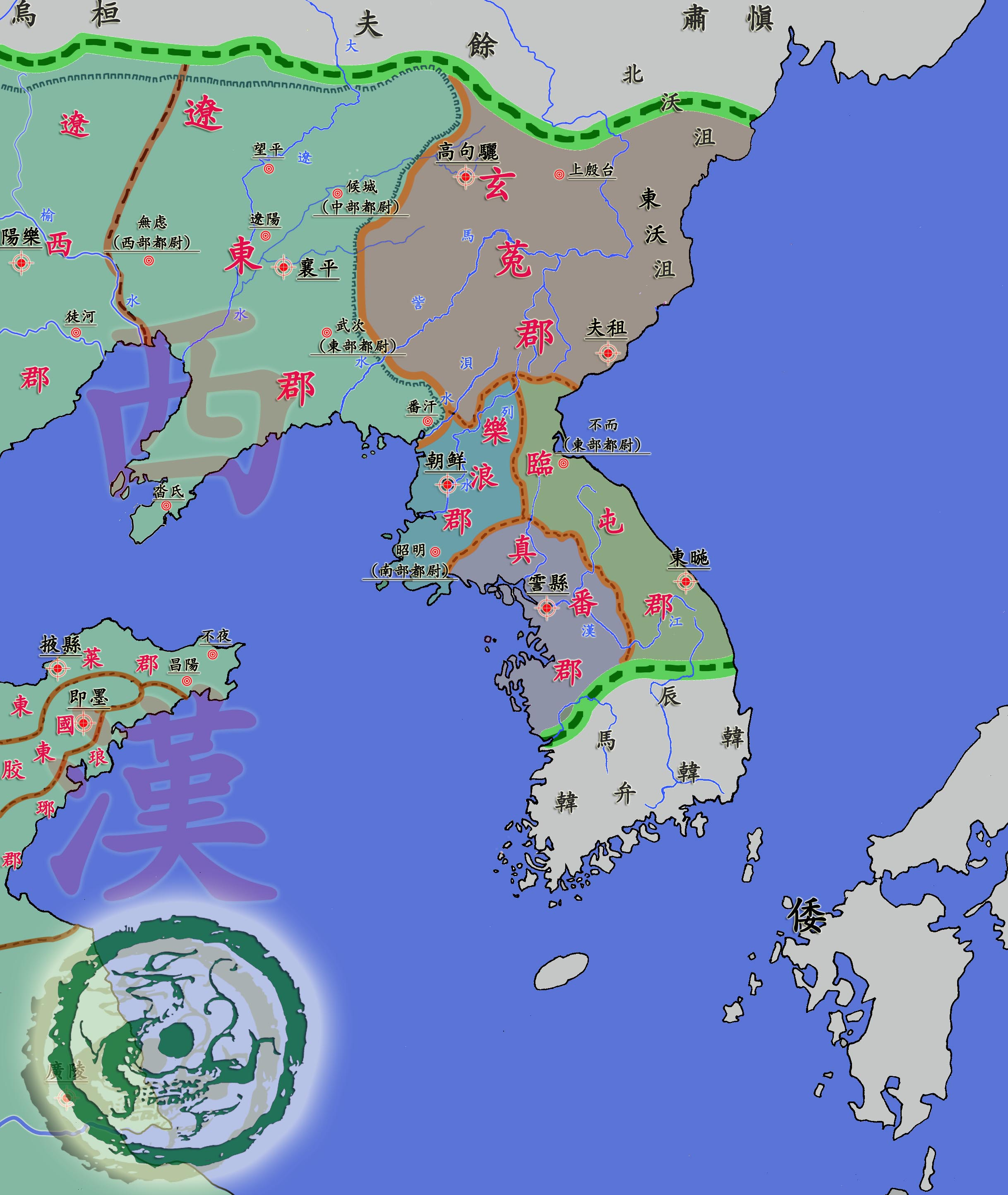 中国漢四郡重新制作中型a.jpg